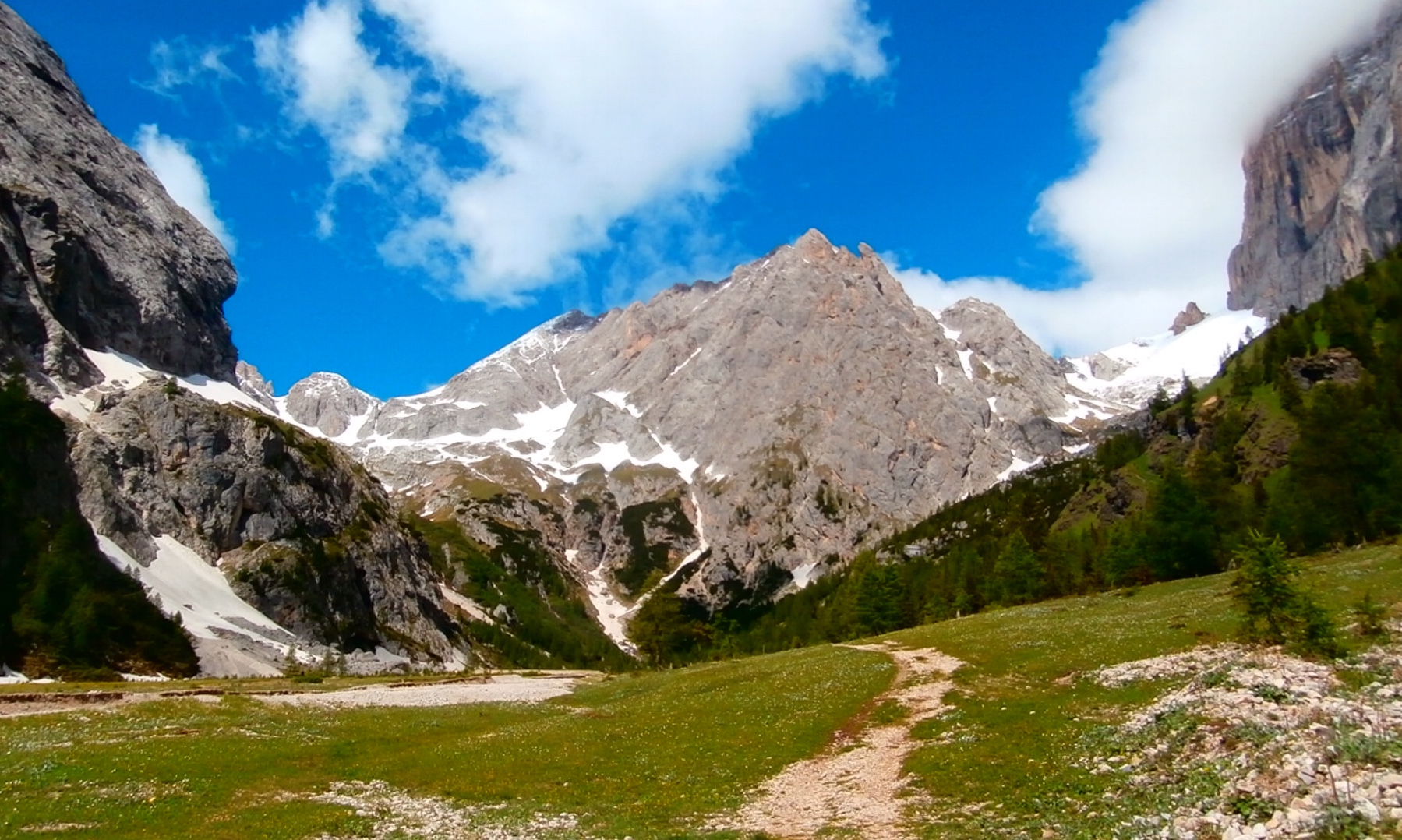 Gruppo Marmolada (Q49963342)